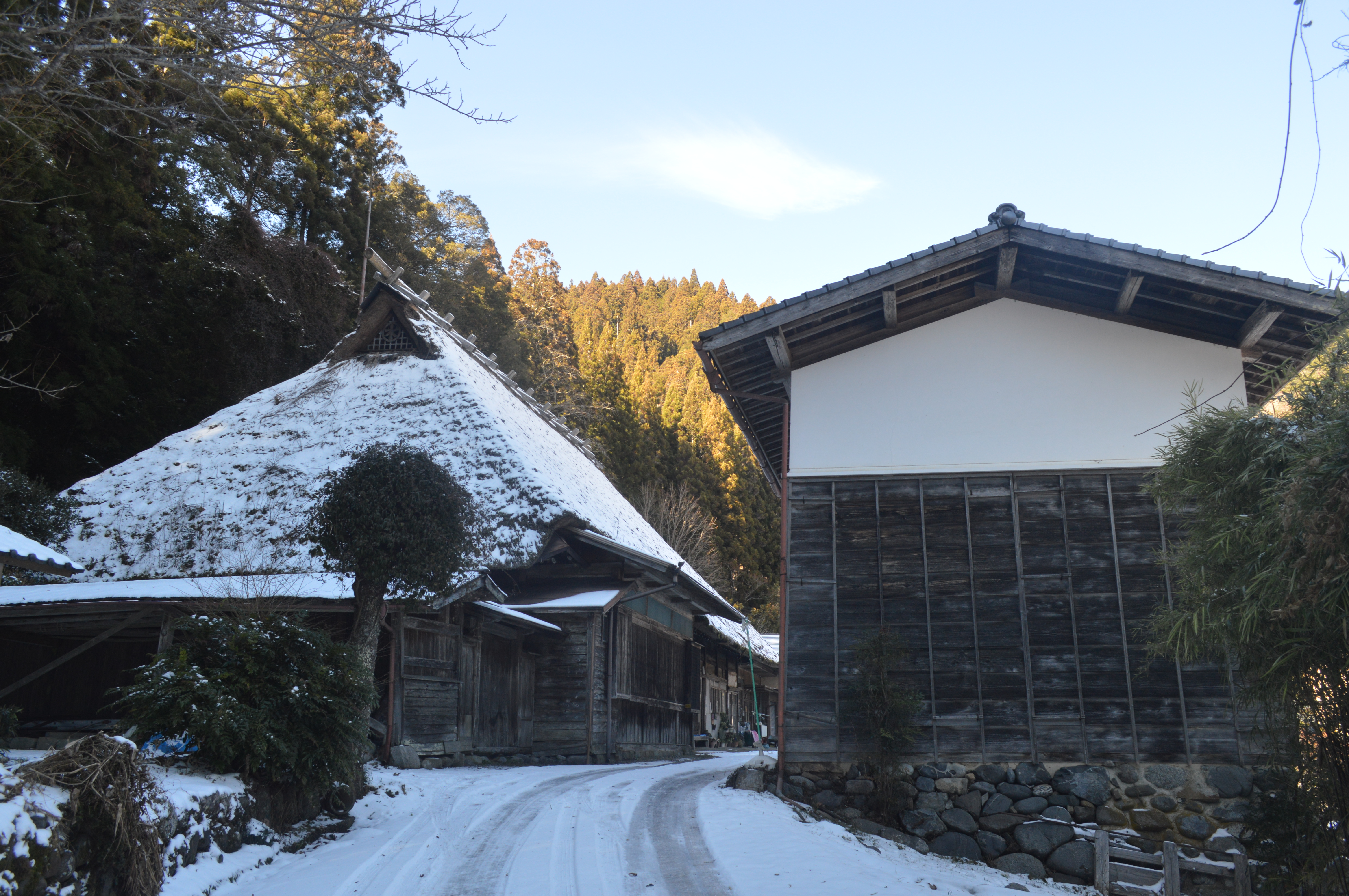 愛知県北設楽郡豊根村の熊谷家住宅。国の重要文化財。